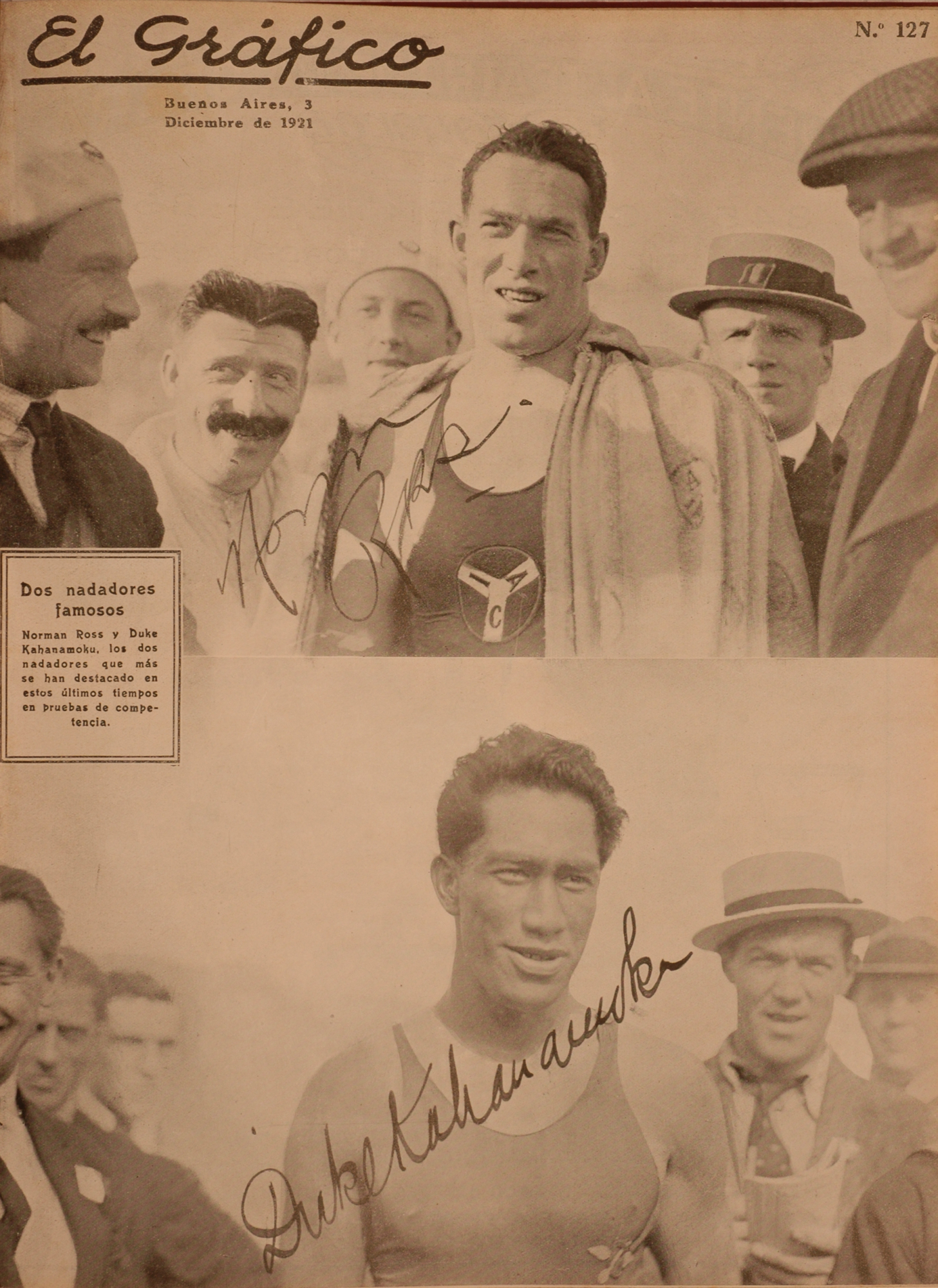 El Grafico del 03 de Diciembre de 1921. Edicion 127